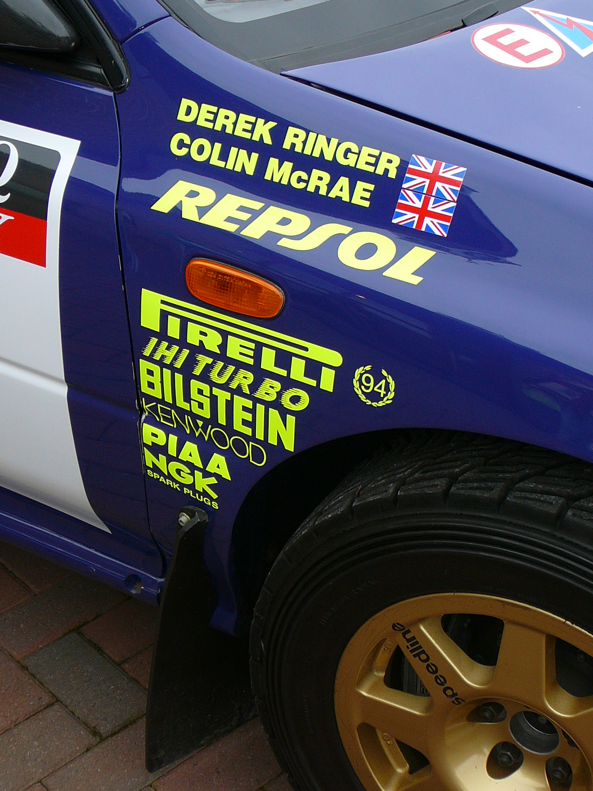 Sponsors